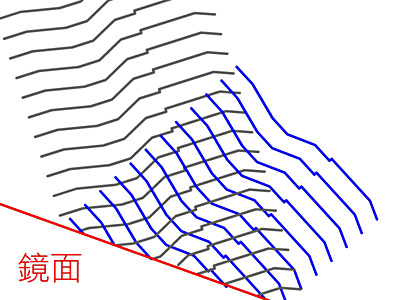 無適應光學